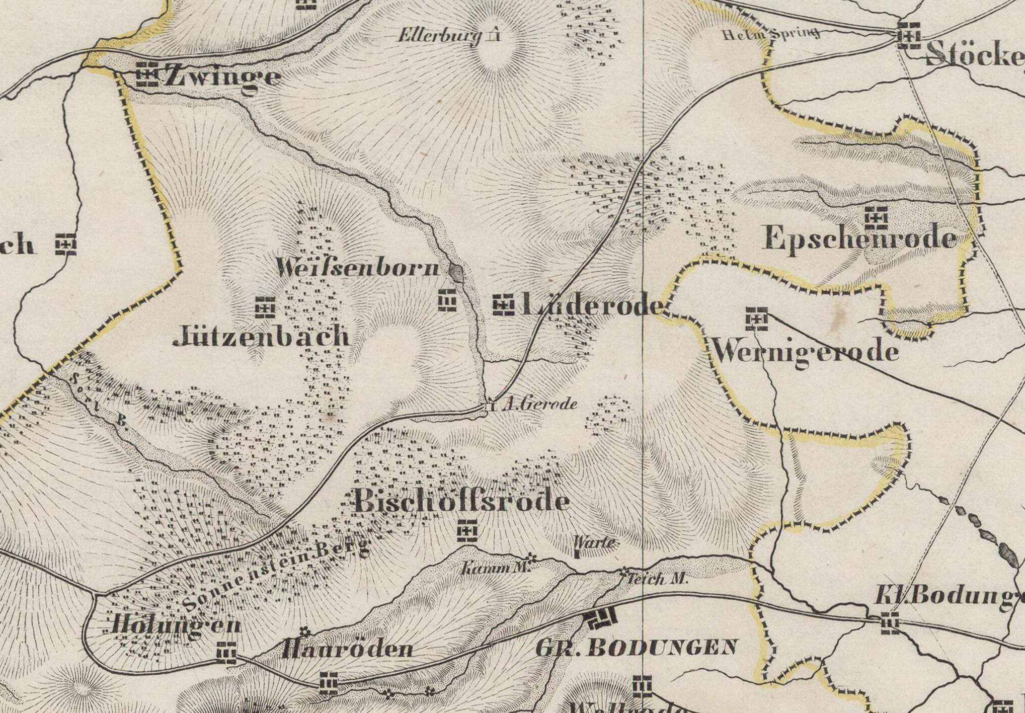 Karte des Kreises Worbis im Jahr 1840, gezeichnet von Albr. Platt, Langensalza bei F. G. E. Gressler